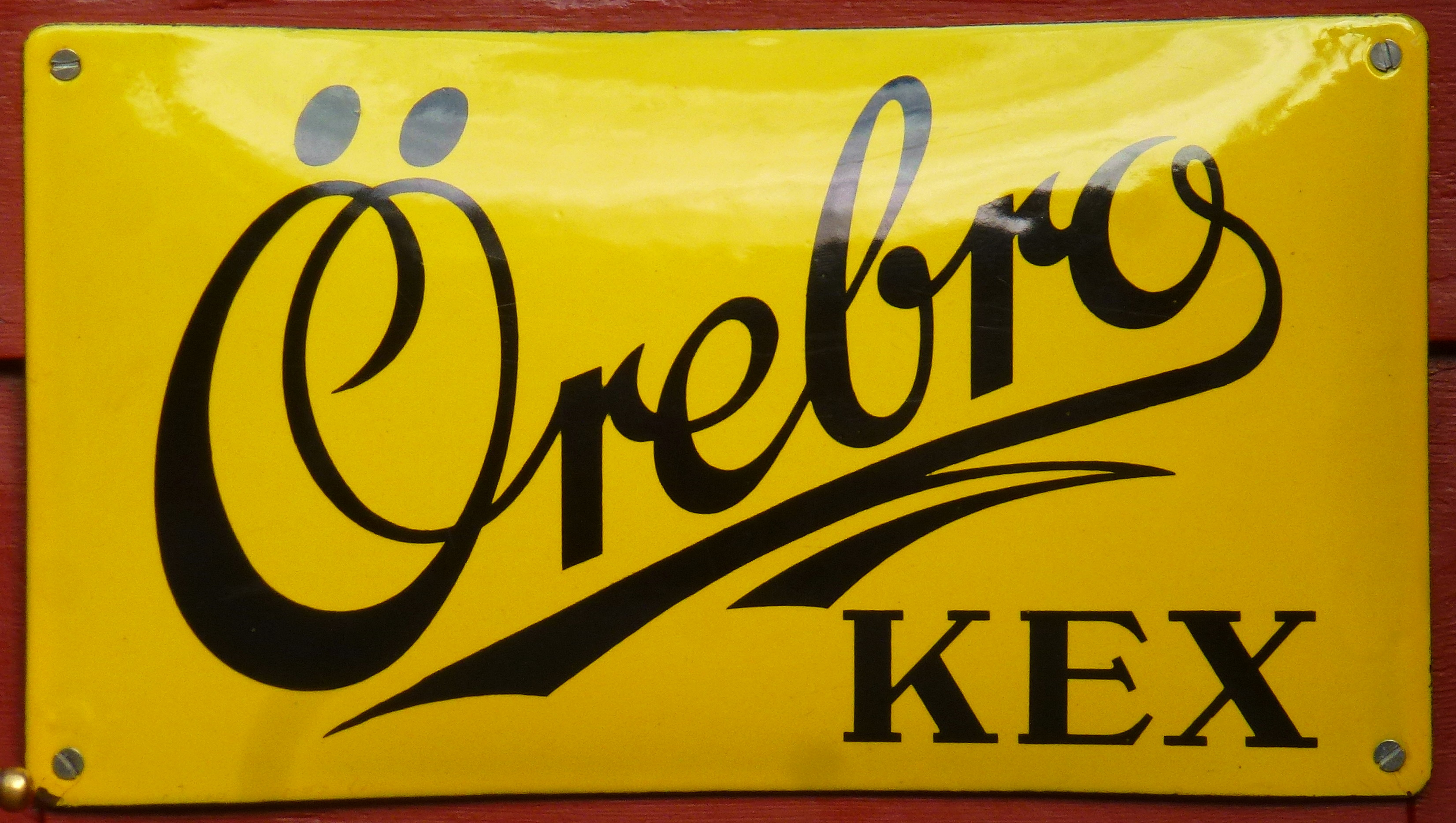 Örebro kex emaljskylt